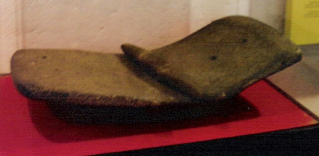 Este es un metate precolombiano. yo tome esta fotografia en el museo que se encuentra en la reserva de cuicuilco. Dicese Precolombino, y no Precolombiano, ya que es un adjetivo referente a la época antes de la llegada de Colón, no antes de Colombia.